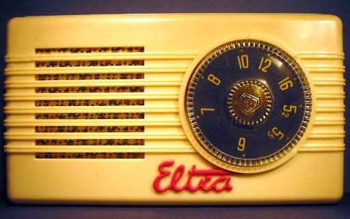 Radio Eltra MOT-59 przód)